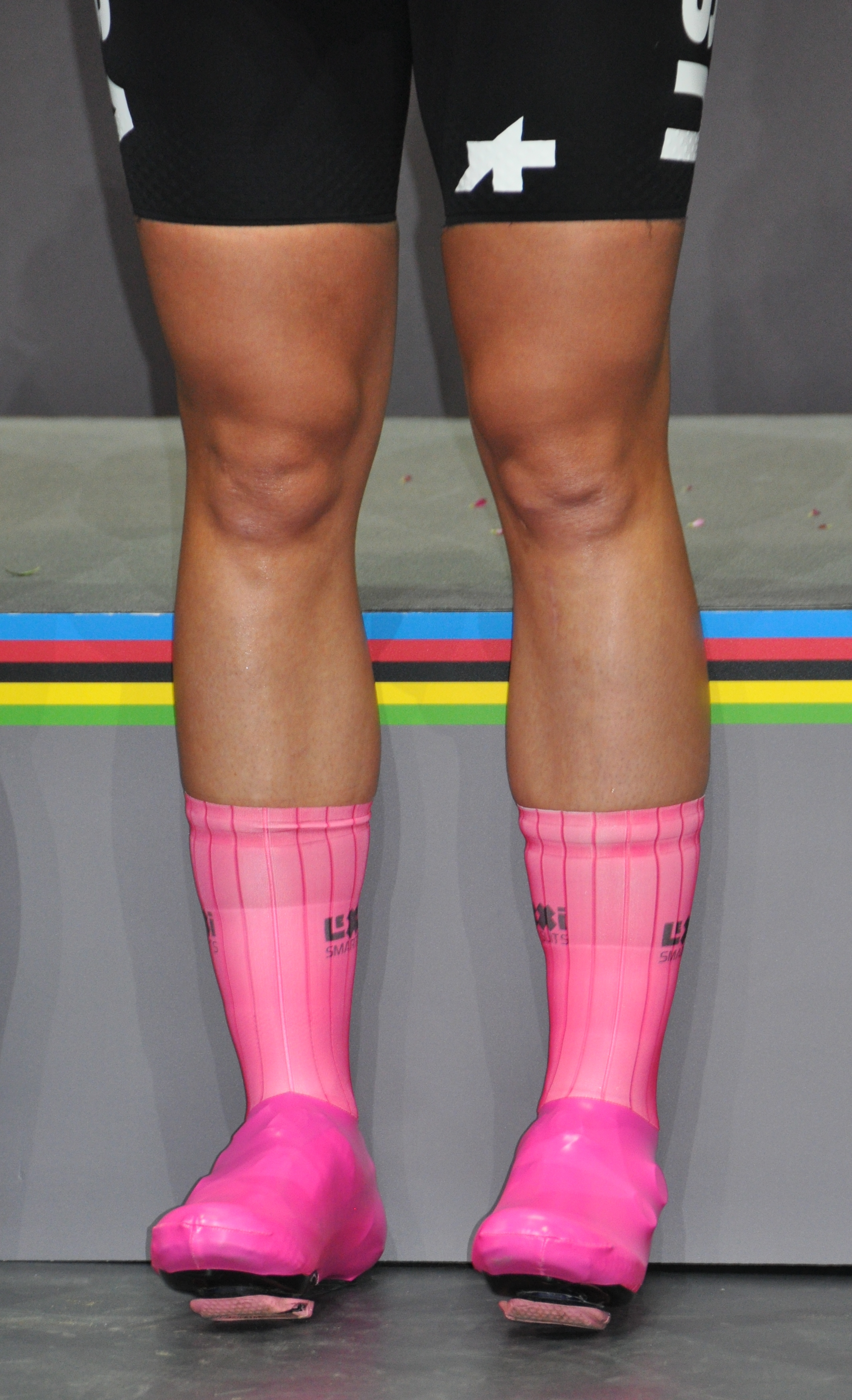 Pink socks and shoes of Chloé Dygert